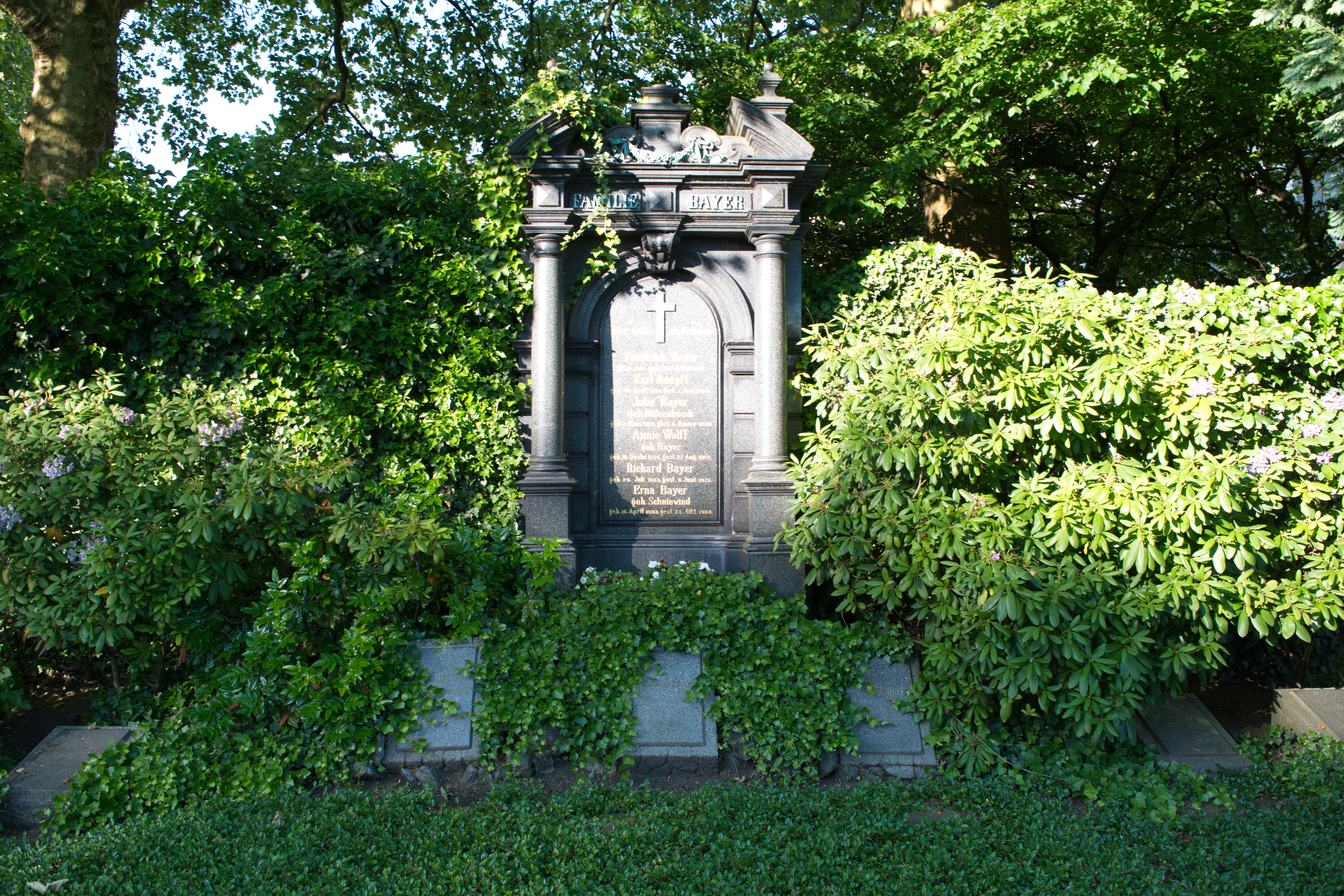 Hochstraße, Wuppertal